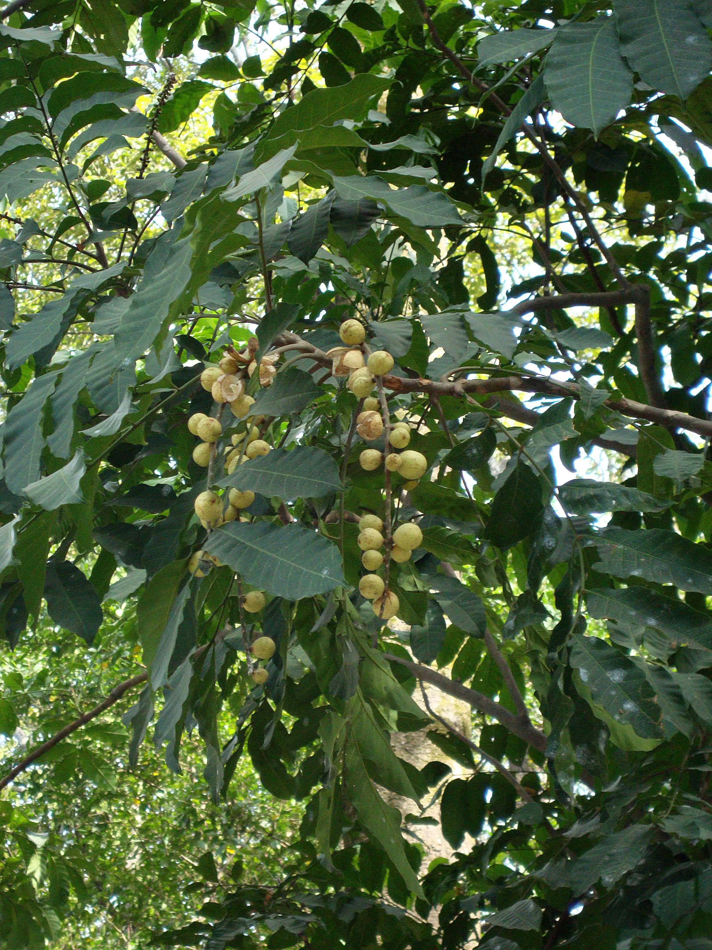 Aphanamixis polystachya (Wall.) R.N.Parker, 1931Tiếng Việt: Gội nước, Nàng gia, Gác đa bông